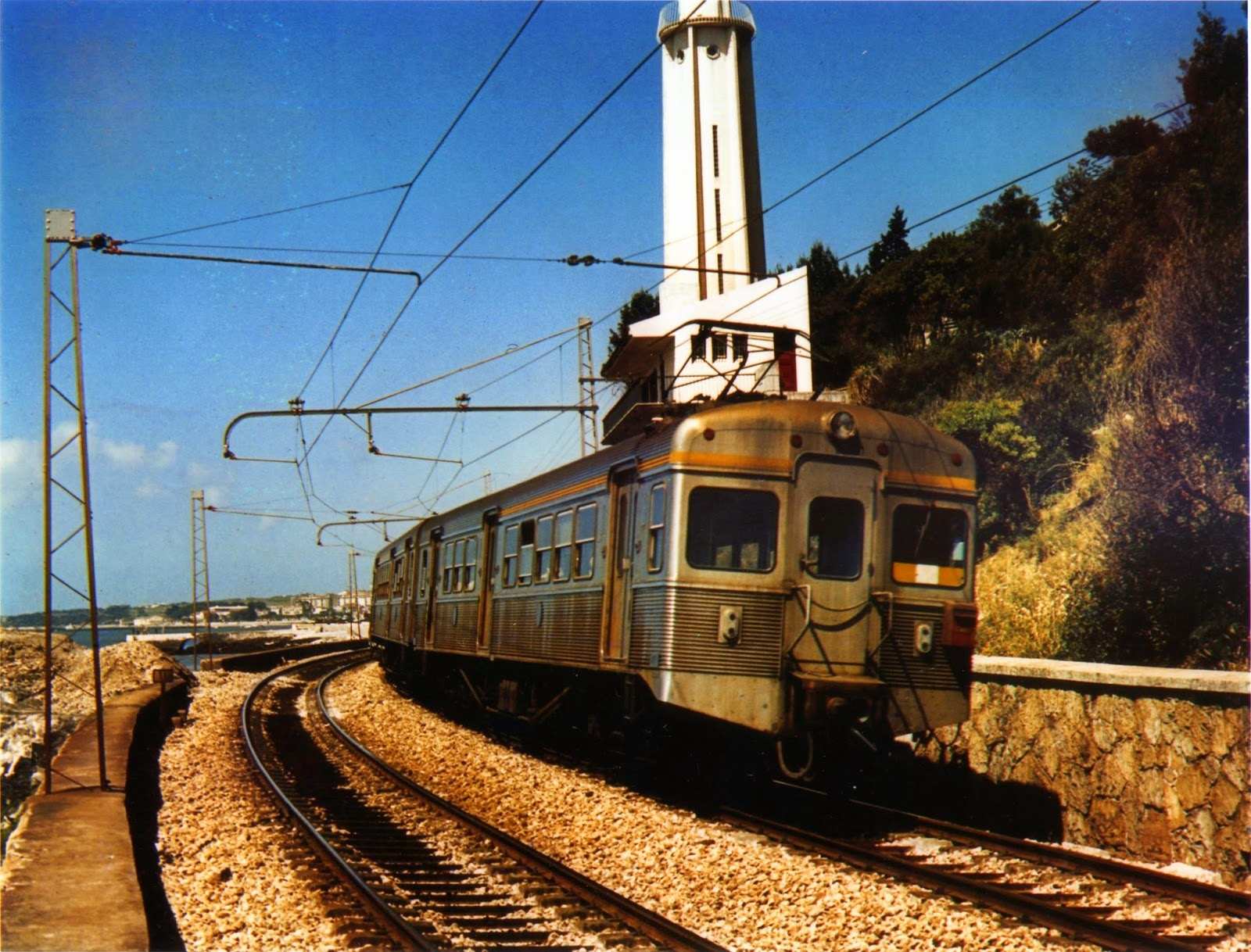 Composição da linha de Cascais de fabrico Sorefame junto ao farol da Gibalta em meados dos anos 60.